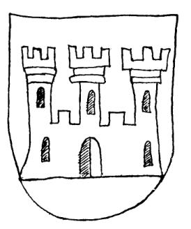 Grzymała z Kroniki Soboru w Konstancji